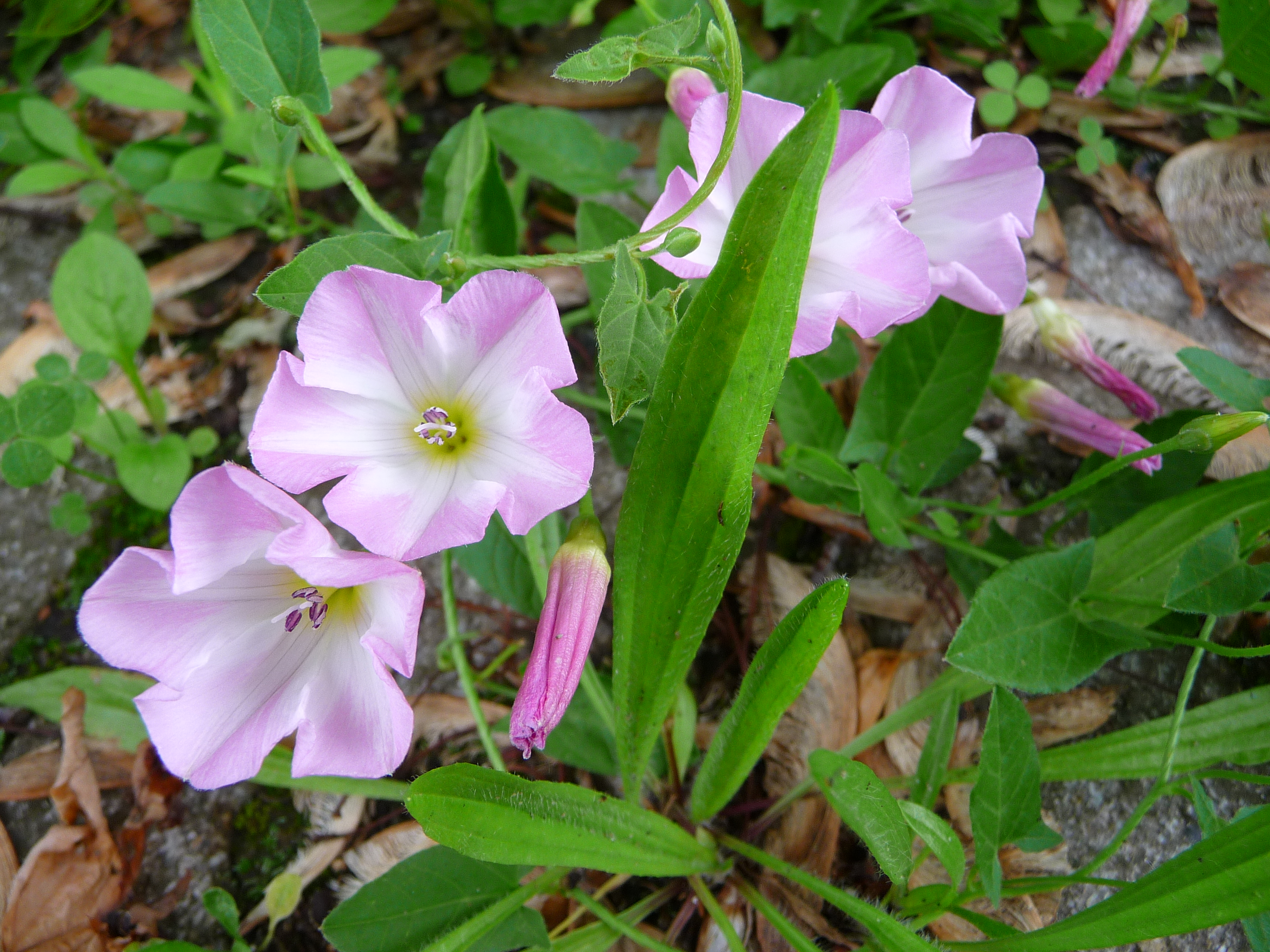 Ackerwinde (Convolvulus arvensis), fotografiert in Heidelberg (Baden-Württemberg, Deutschland)